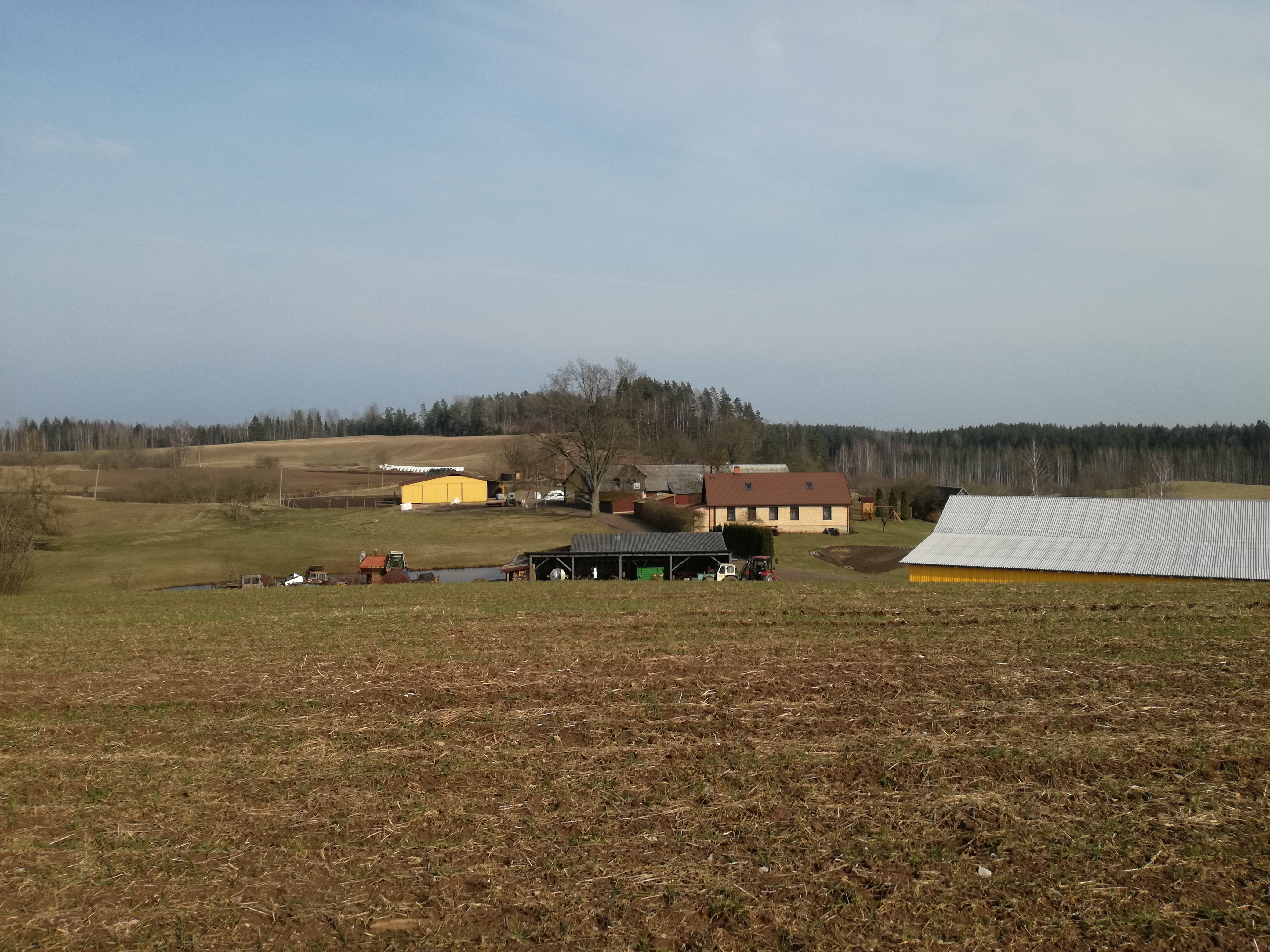 Saimniecība Lielajā ciemā